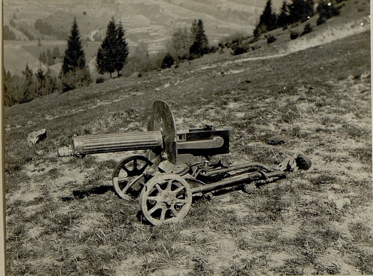 Erbeutetes russisches Maschinen Gewehr.